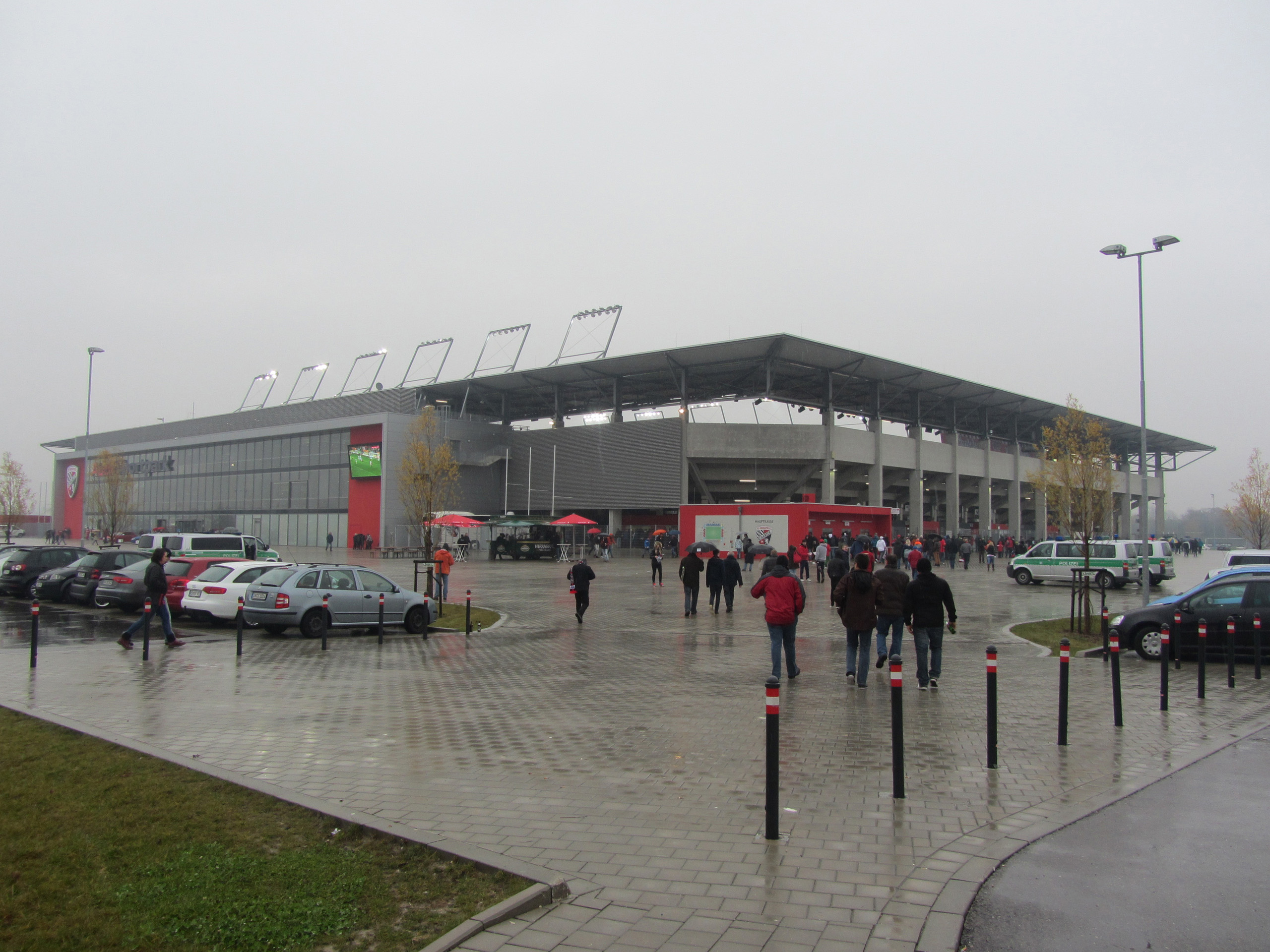 2012-11-11, Audi-Sportpark FC Ingolstadt 04 - Jahn Regensburg 4:2 (2. Bundesliga)